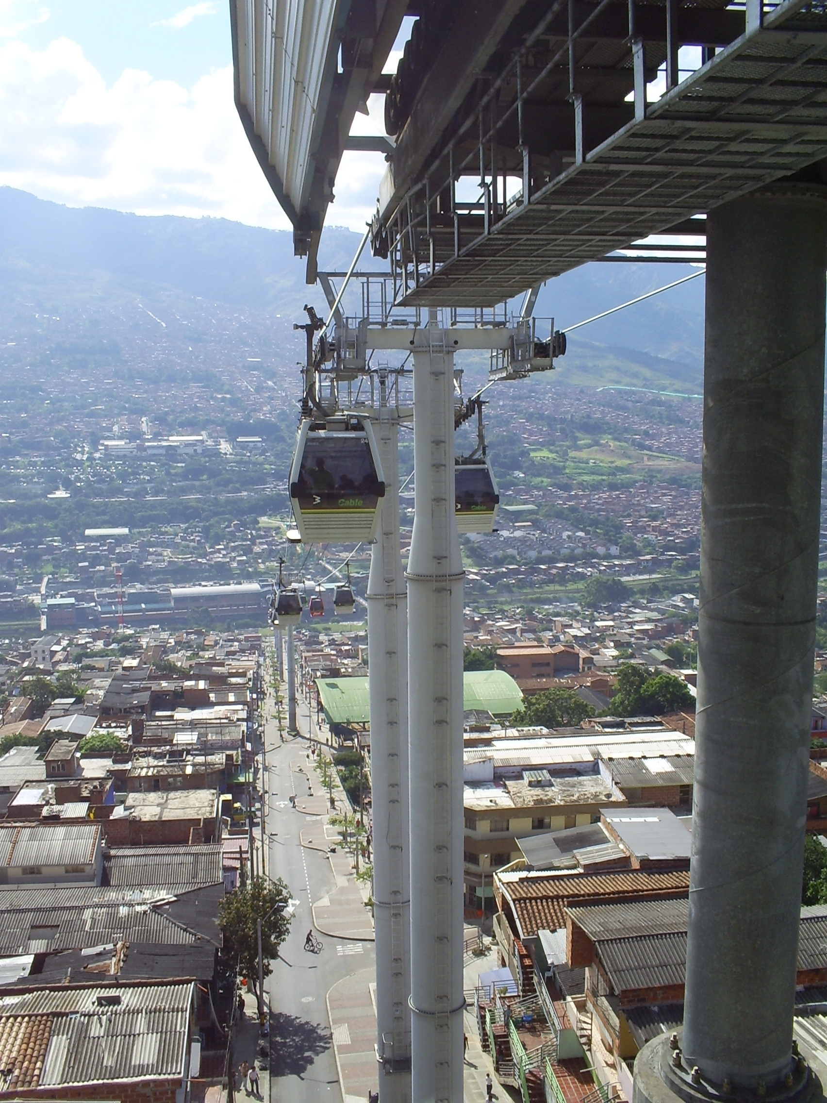 Metro de Medellín, Línea K, Medellín, Colombia